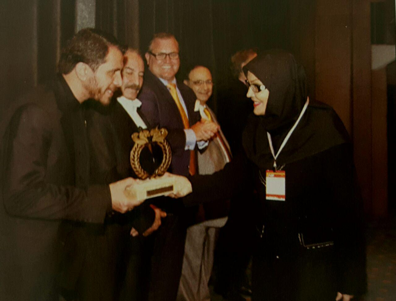 ساناز مینایی در همایش نشان منتخب